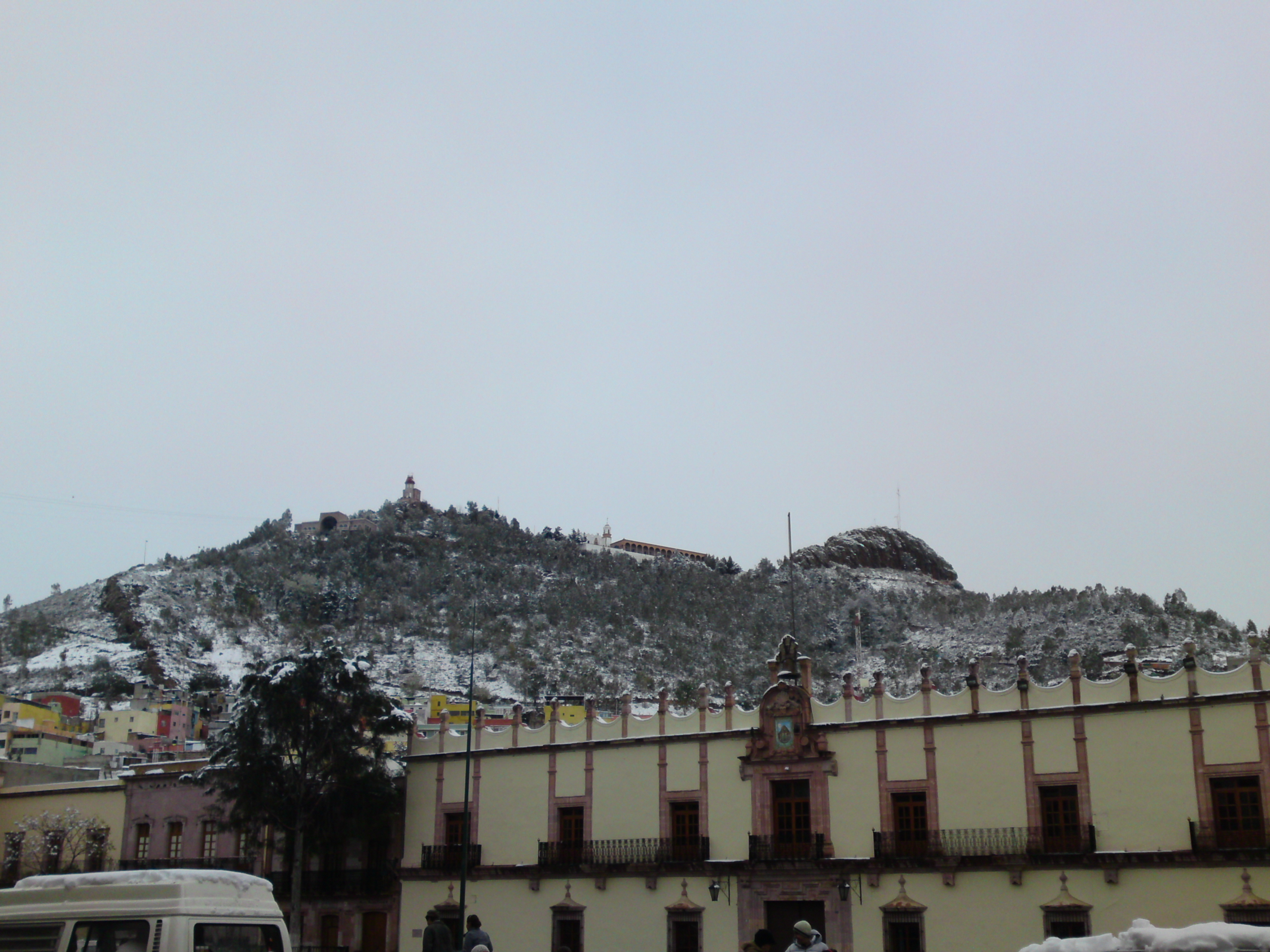 Nevada 2010 La Bufa